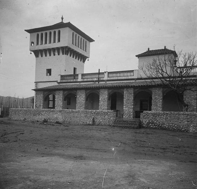 Antic Hotel modernista de Terramar (1919-1932) de l’arquitecte Josep Maria Martino Arroyo. Josep Salvany i Blanch (1921)